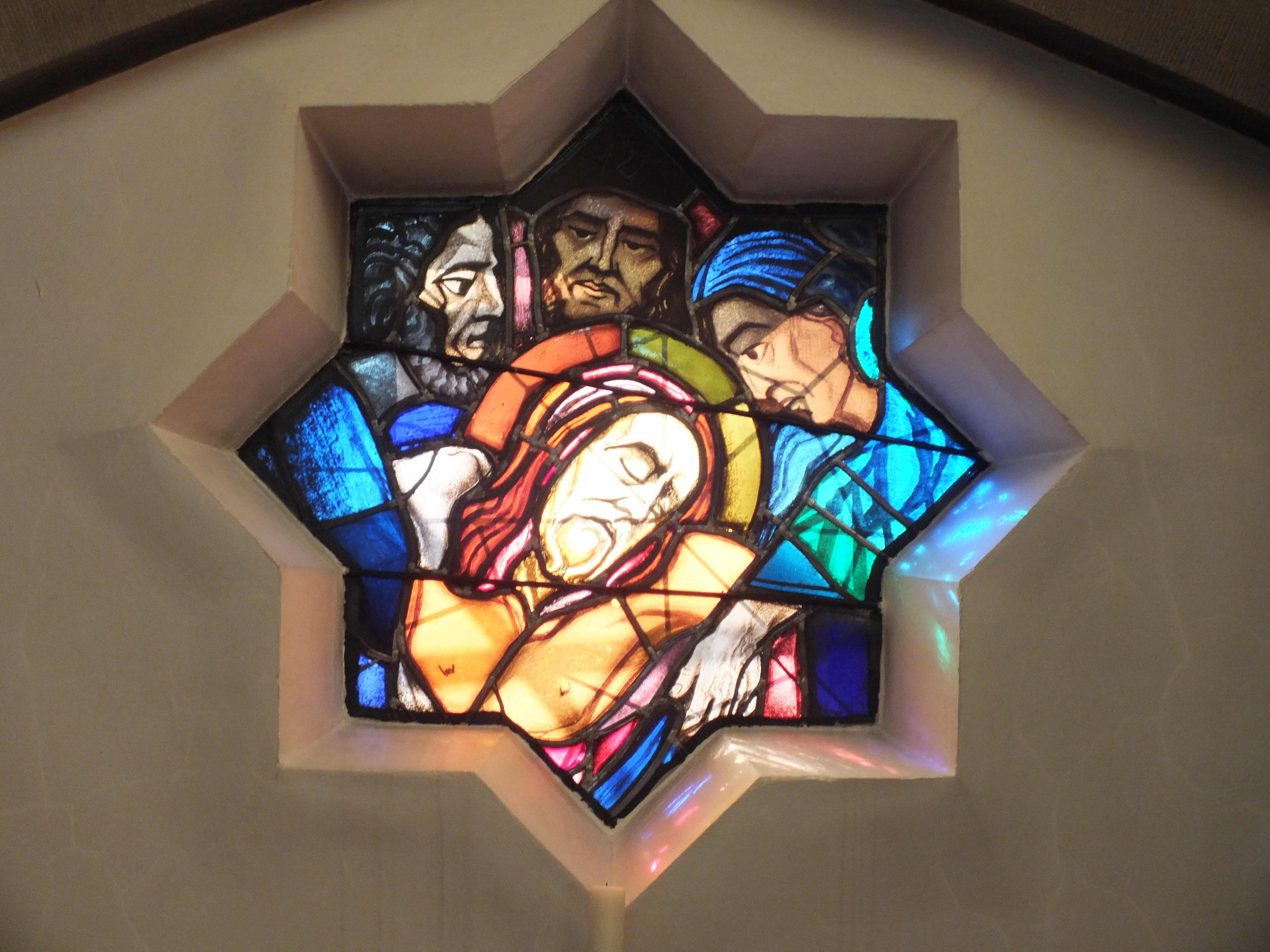 Kirche Maria Magdalena, Berlin-Niederschönhausen: eines von 14 Kreuzwegfenstern